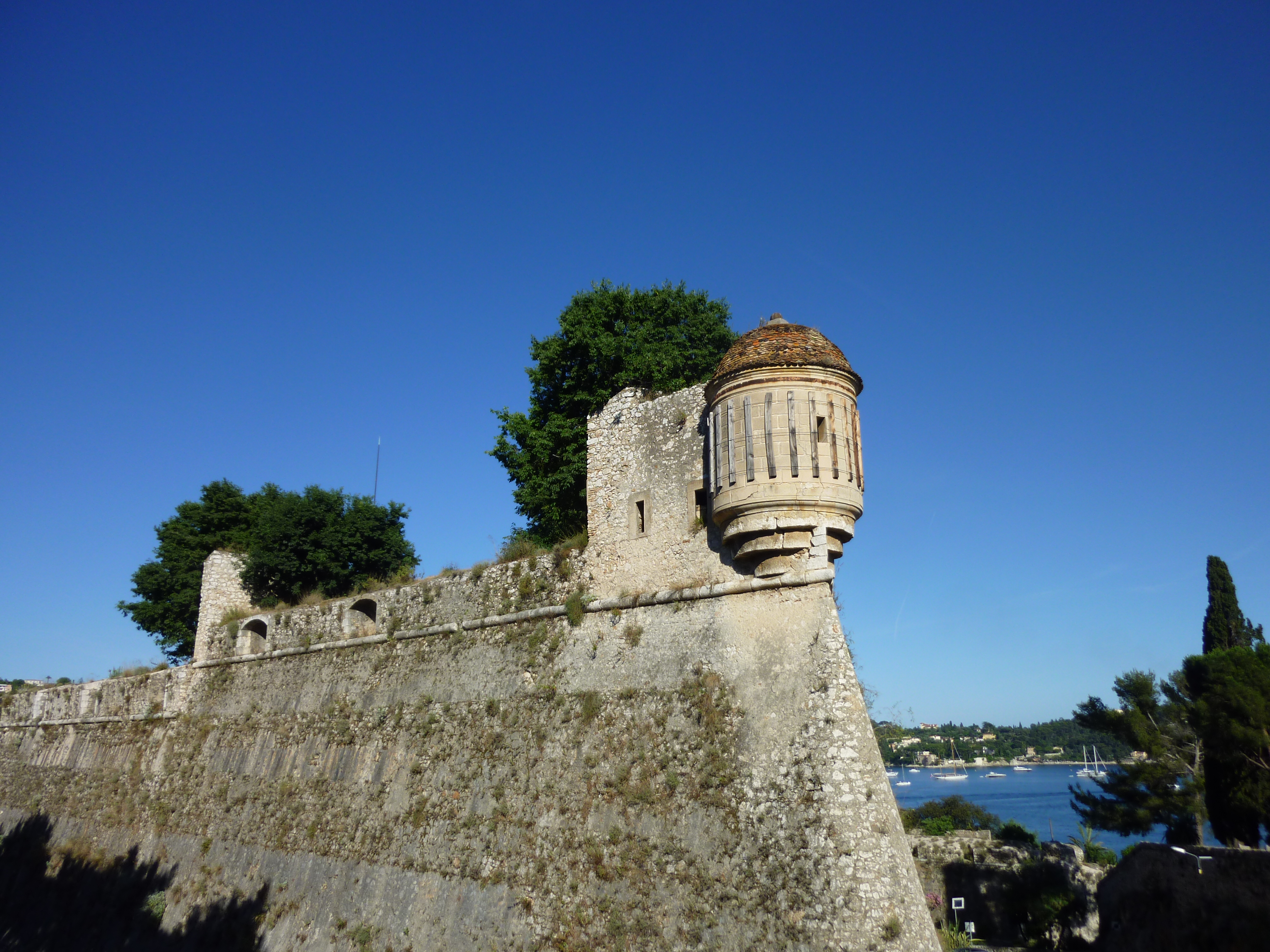 Partie des remparts de la citadelle de Villefranche-sur-Mer, Alpes-Maritimes, France. .